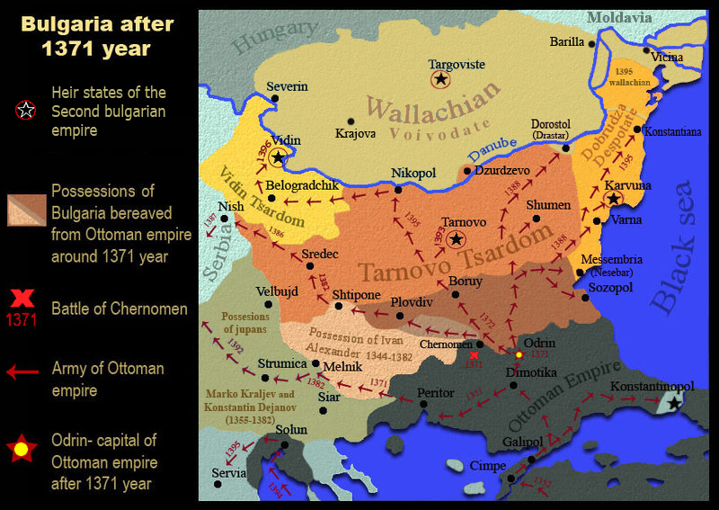 La Bulgarie et ses états héritiers, 1371 Bulgaria & its heir states, 1371